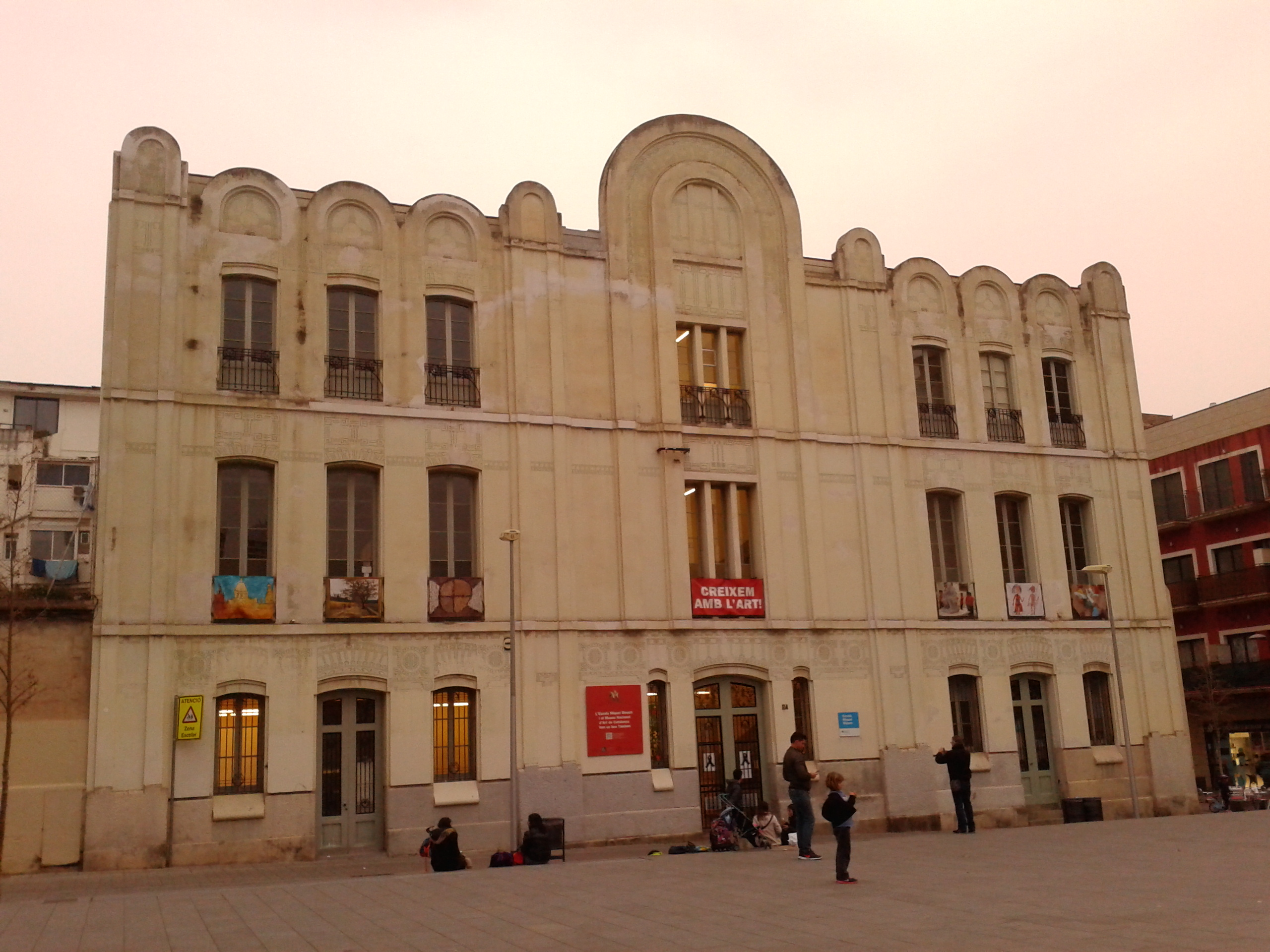 Escola Miquel Bleach al barri d'Hostafrancs de Barcelona